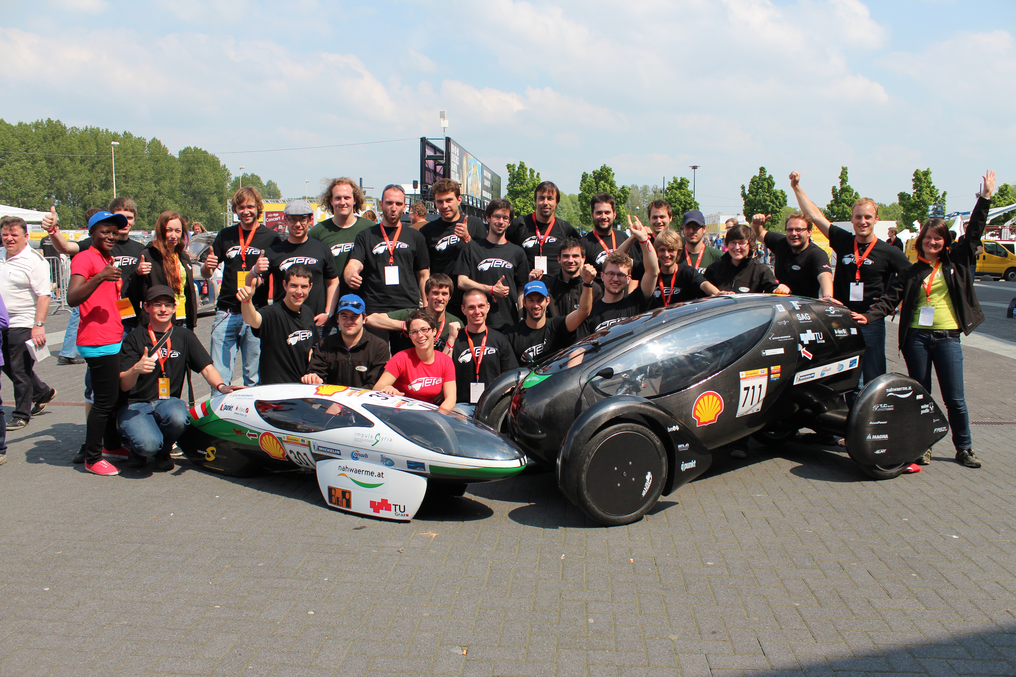 Teamfoto nach der Saison 2012, aufgenommen am Shell Eco-Marathon 2012 in Rotterdam.